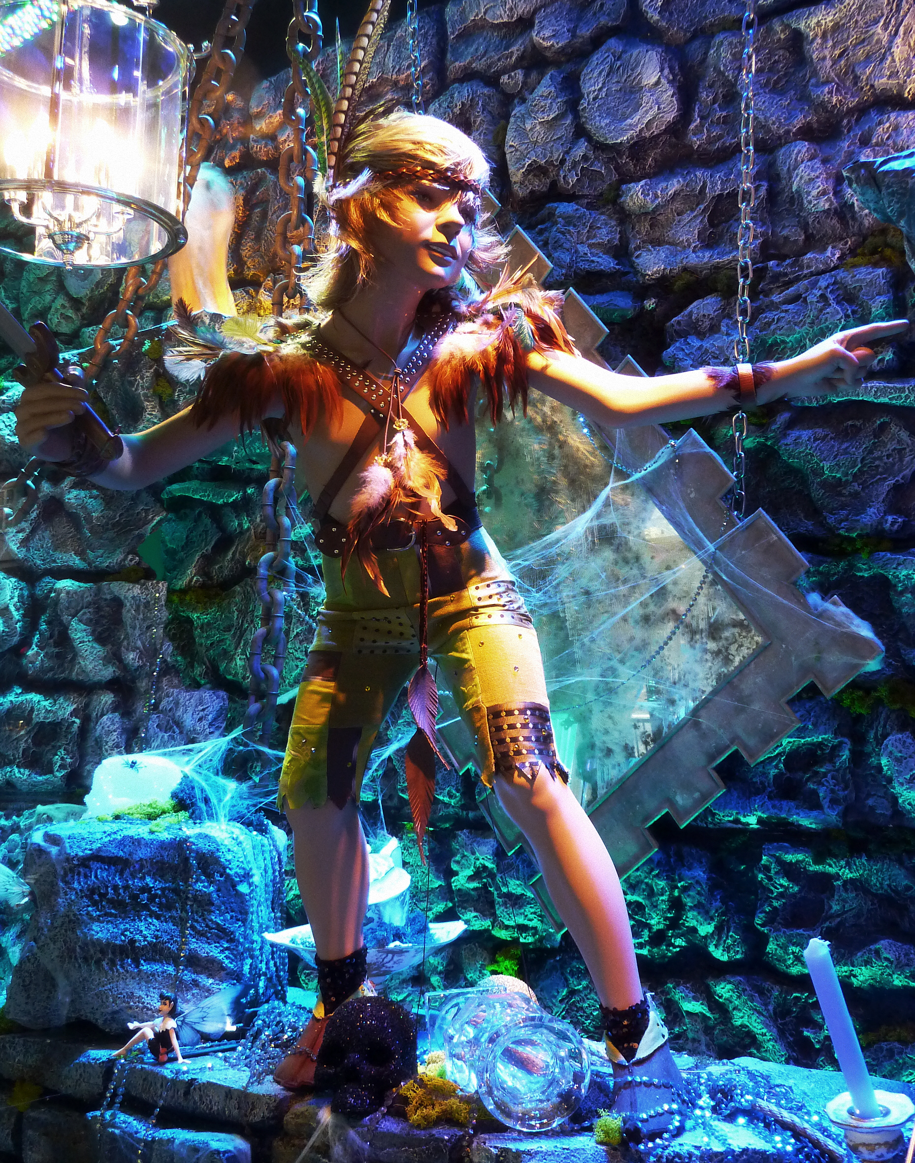 Schaufenstergestaltung zum Thema Peter Pan in der Brompton Road, London, UK.